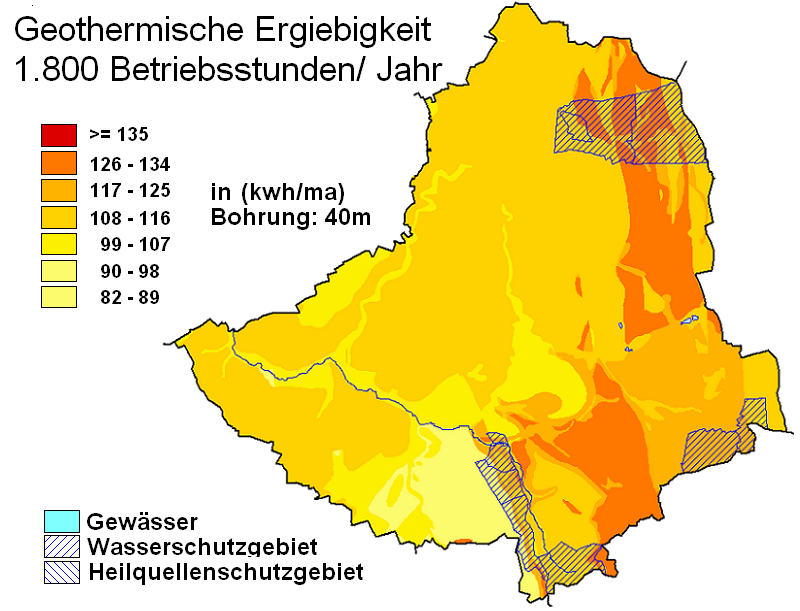 geothermische Karte Lichtenau (Westfalen)